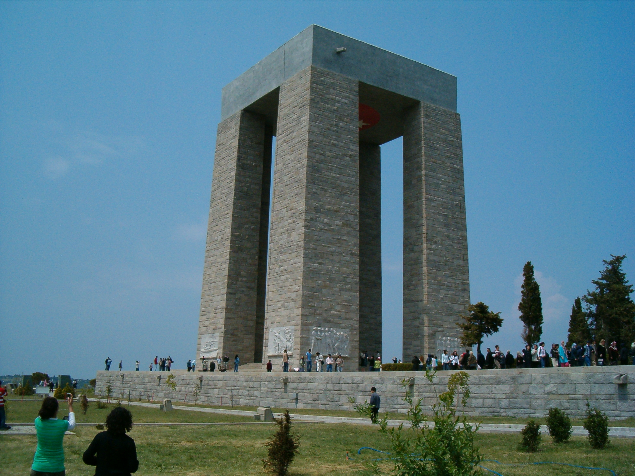 Feridun Kip İkinci Ulusal Mimarlık Akımı’nın önemli örneklerinden birisi olan Çanakkale Şehitleri Anıtı’nı Doğan Erginbaş ve İsmail Utkular ile birlikte tasarlamıştır.